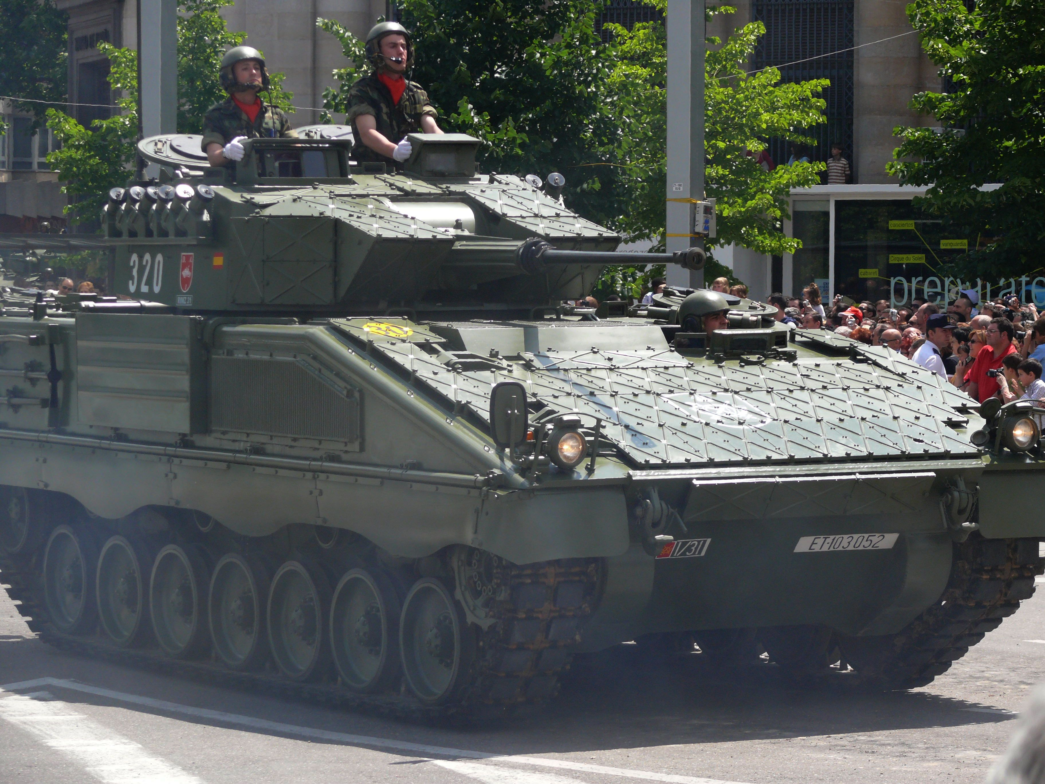 VCI Pizarro. Desfile de las Fuerzas Armadas. España, 01-06-2008.